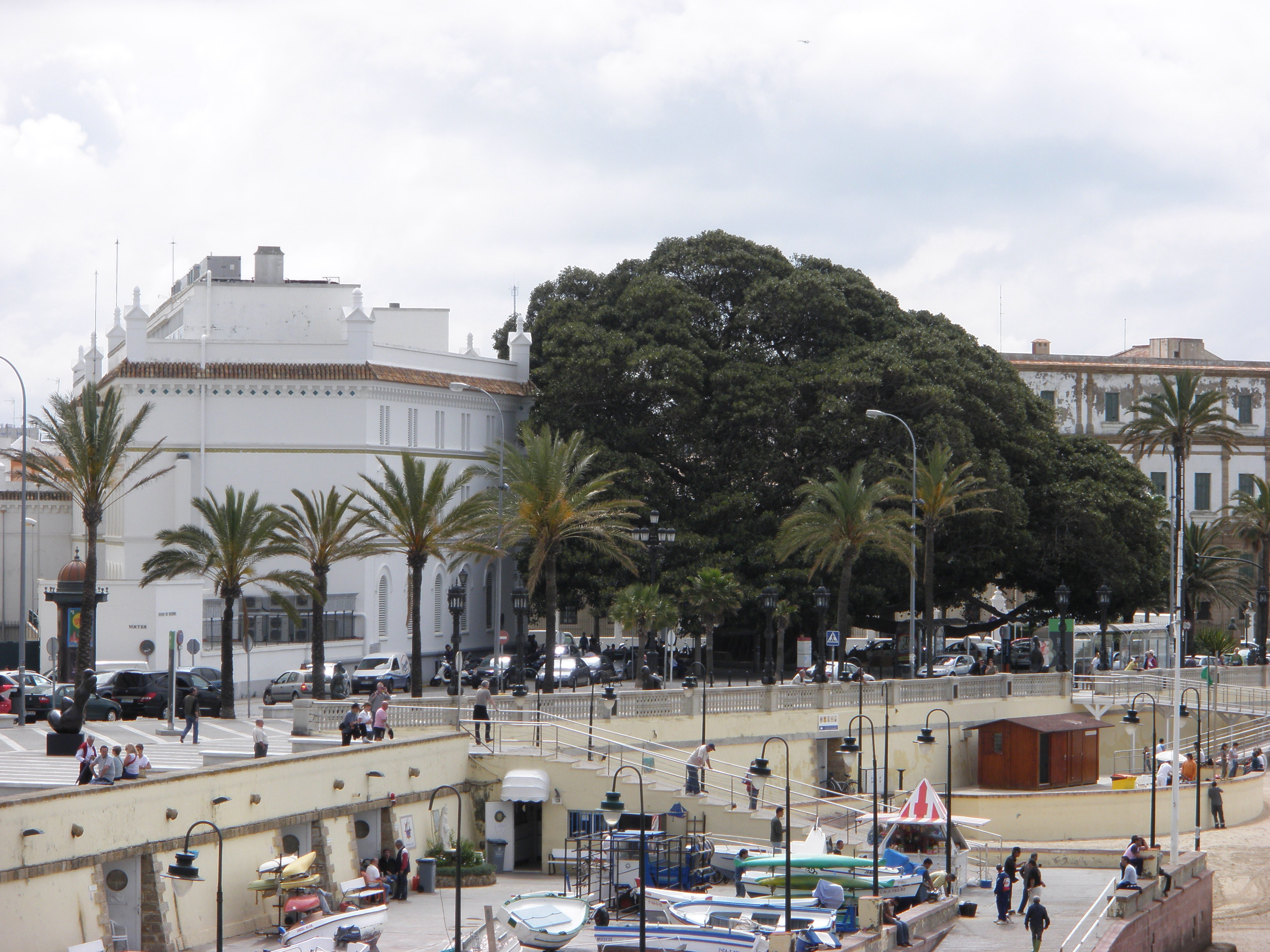 Ficus Facultad de Ciencias Económicas y Empresariales, Universidad de Cádiz. Aproximadamente 100 años de edad.